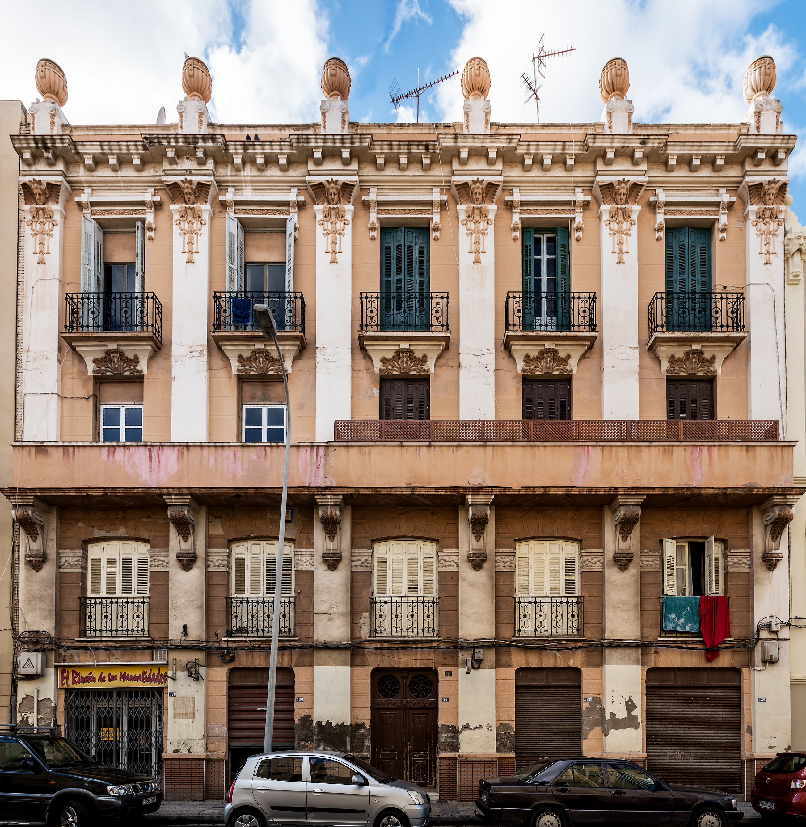 La Casa de José Zea y Manuel Alvadalejo es un edificio de viviendas de estilo modernista de la ciudad española de Melilla, situado en la calle Álvaro de Bazán, 38 y forma parte del Conjunto Histórico Artístico de la Ciudad de Melilla, un Bien de Interés Cultural.